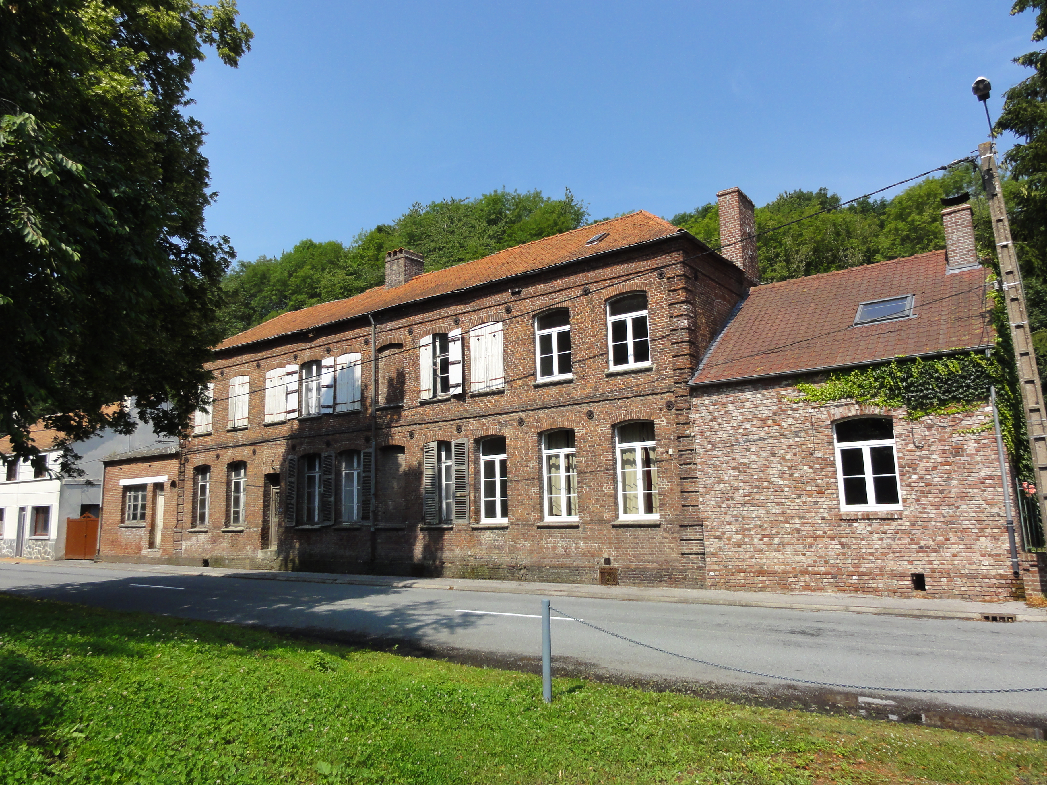 La Fosse de Fléchinelle de la Compagnie des mines de la Lys-Supérieure, devenue la Fosse n° 1 - 1 bis de la Compagnie des mines de Ligny-lès-Aire était un charbonnage constitué de deux puits situé à Enquin-les-Mines, Pas-de-Calais, Nord-Pas-de-Calais, France.